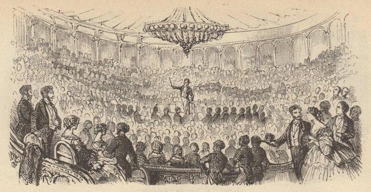 Une séance de l'Orphéon à Paris.